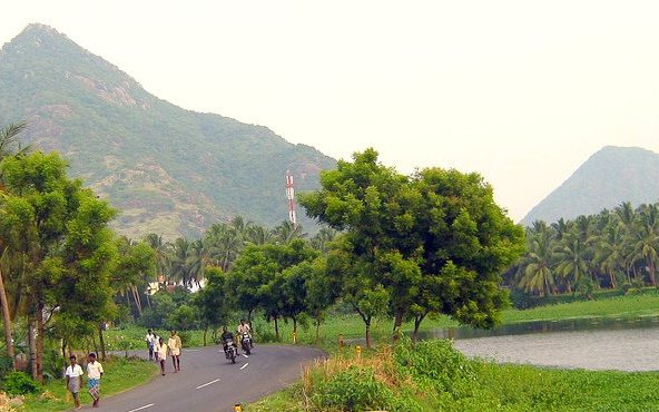 Nagercoil, India.